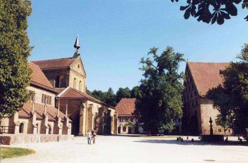 Aufnahme zeigt einen Teil der Klosteranlage Maulbronn mit Klosterkirche. Photographie erstellt 07/2003 von Benutzer:Sansculotte. Bild ist unter der GNU FDL zur weiteren Verwendung freigegeben. Quellenangabe und Beleg an erbeten. 13:01, 20. Feb 2004 Sansculotte 800 x 528 (73285 Byte) (eigene Aufnahme)